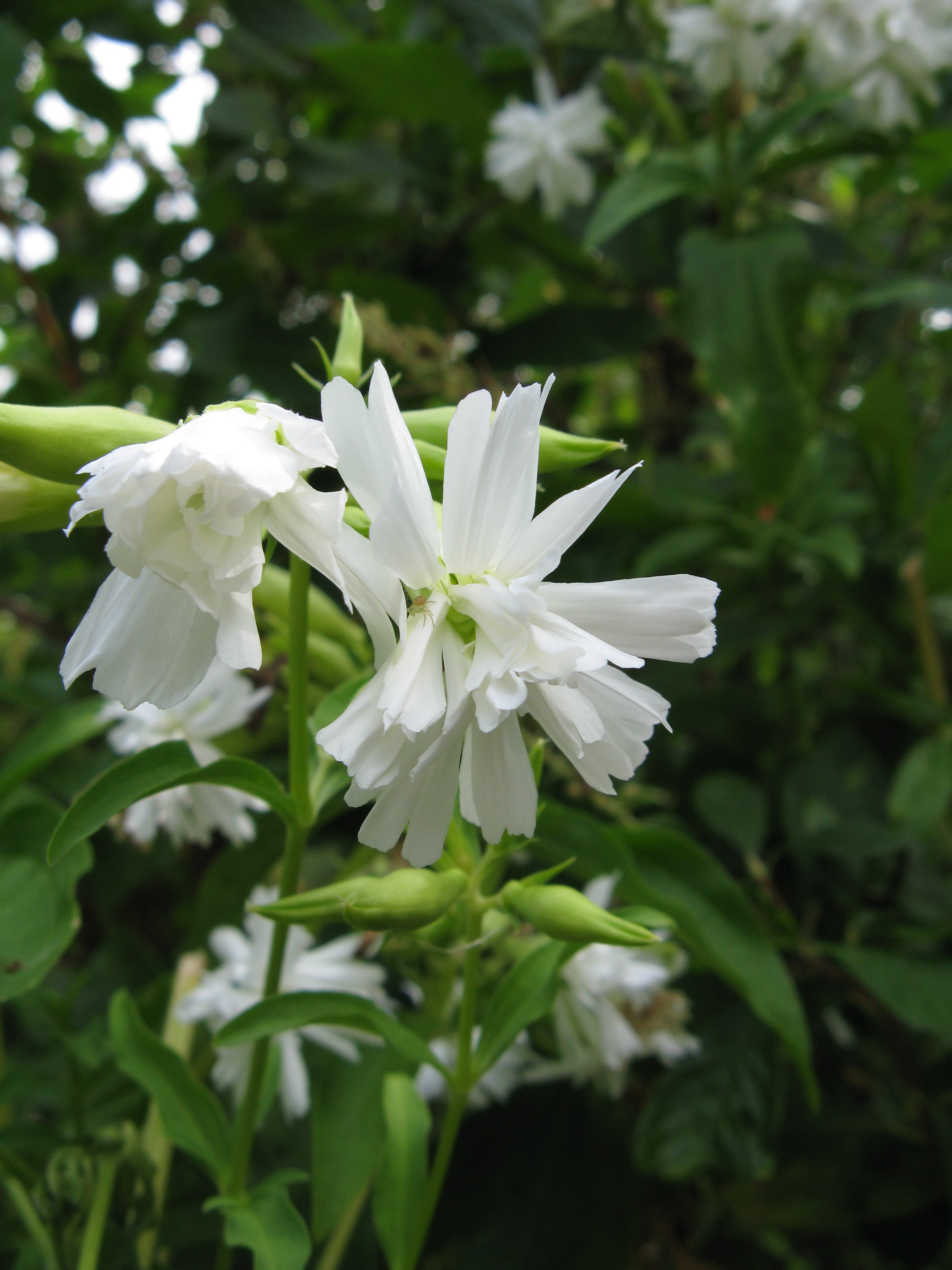 Scientific name Saponaria officinalis cv.